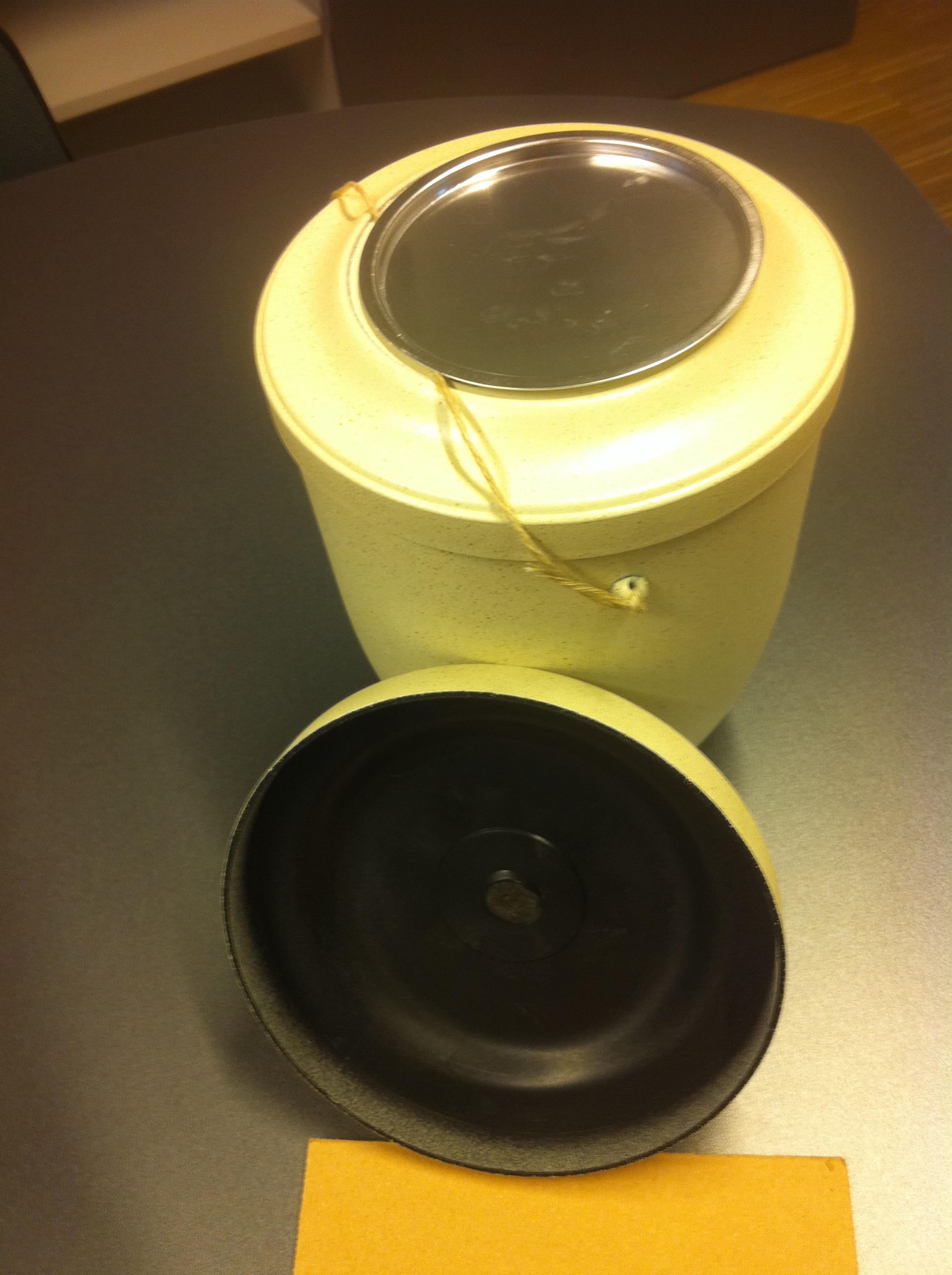 Biologisch abbaubare Urne für Bestattungswälder